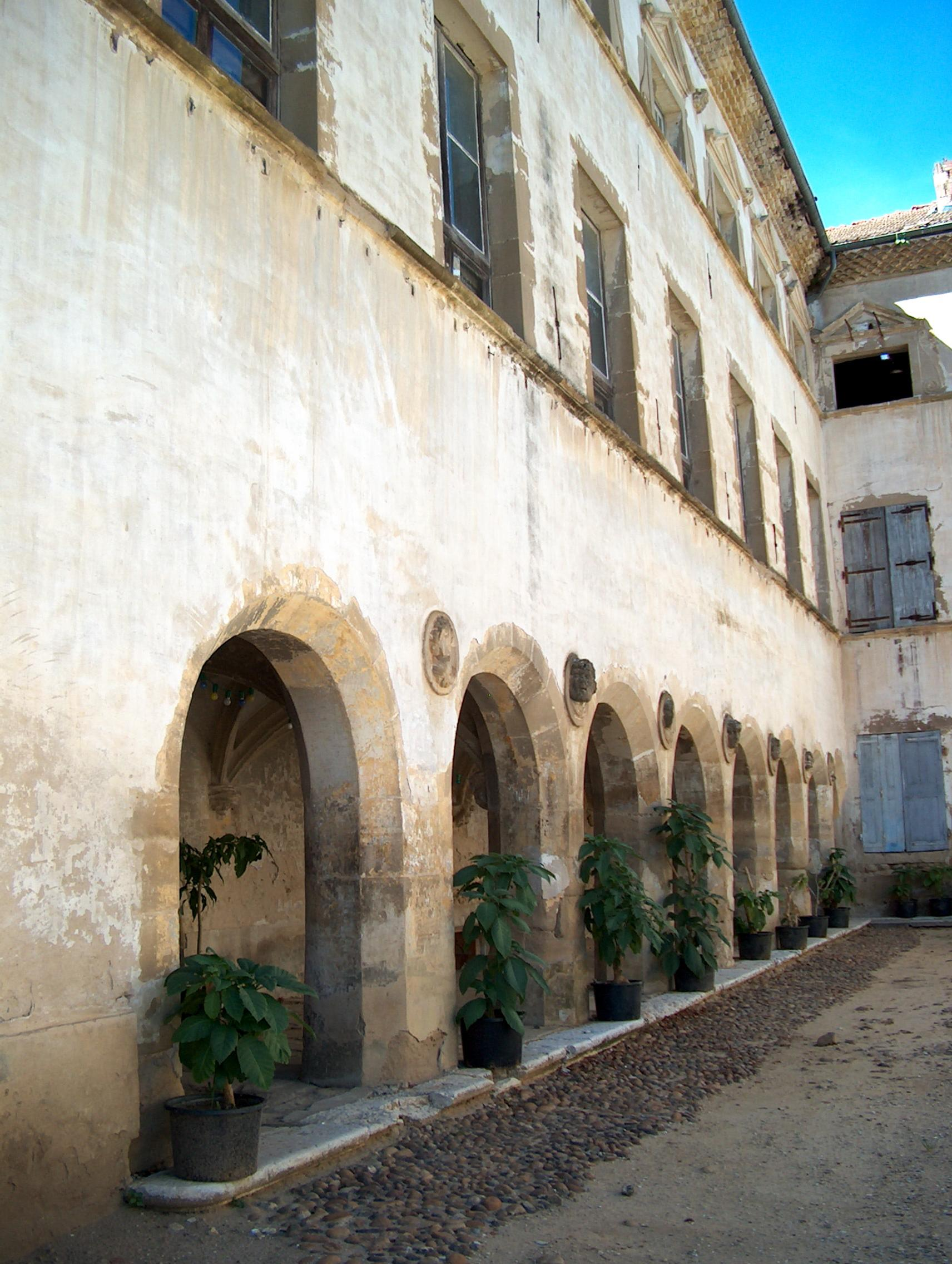 Photo prise par l'auteur, Daniel Etienne Chateau de l'Arthaudière à St Bonnet de Chavagne (Isère)